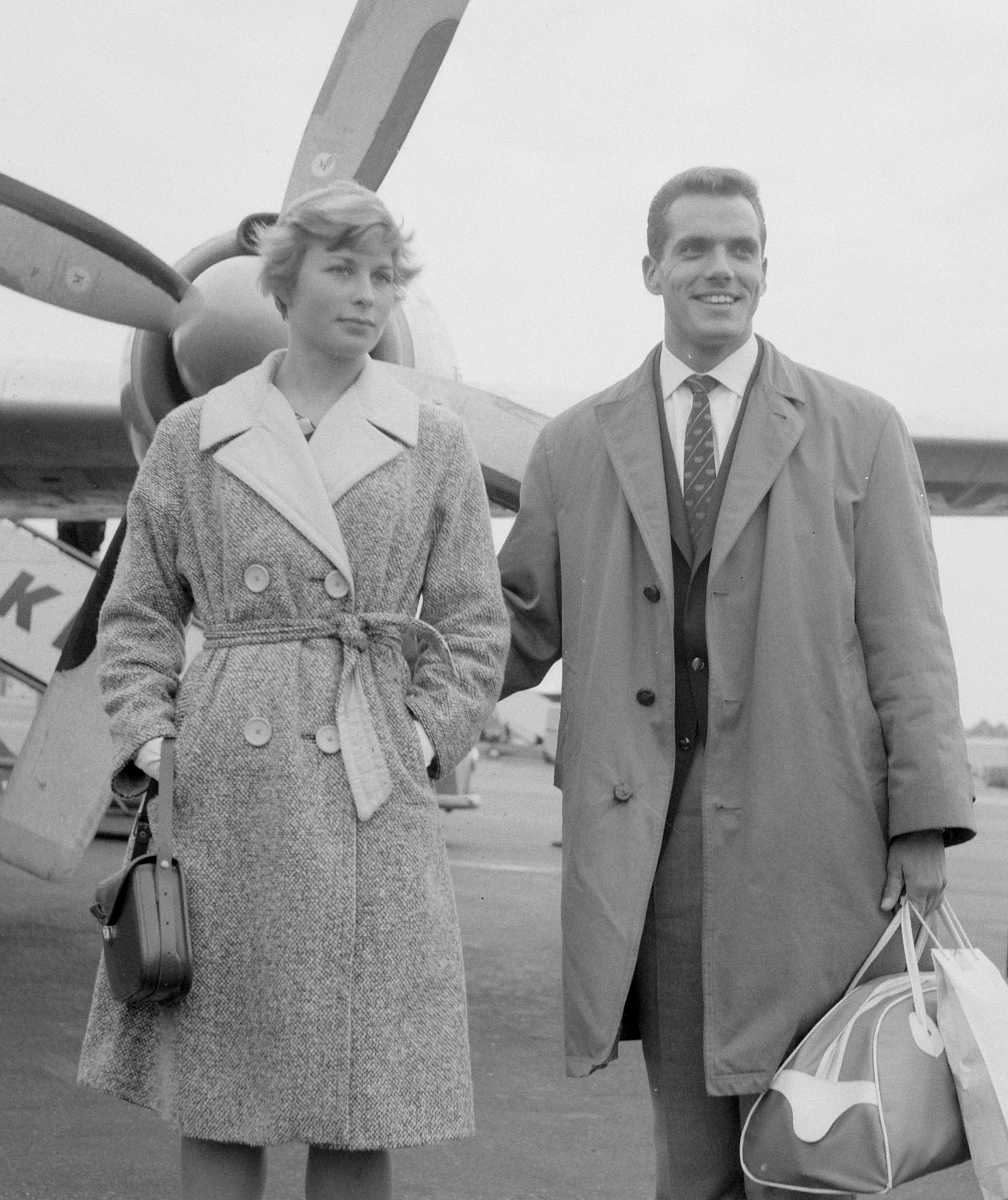 Vertrek Eef Kamerbeek en Mary Bignal naar Londen Mary Bignal en Eef Kamerbeek tijdens persconferentie